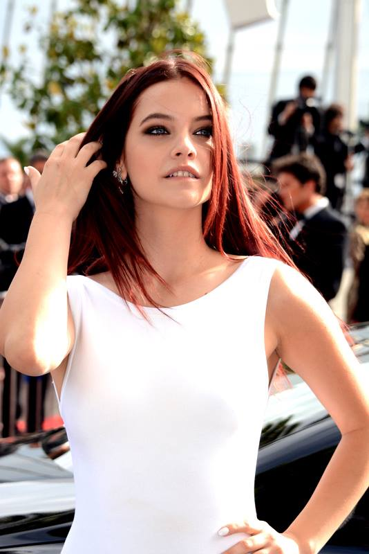 Barbara Palvin au festival de Cannes